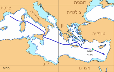 אוניית המעפילים ביריה - מסלול